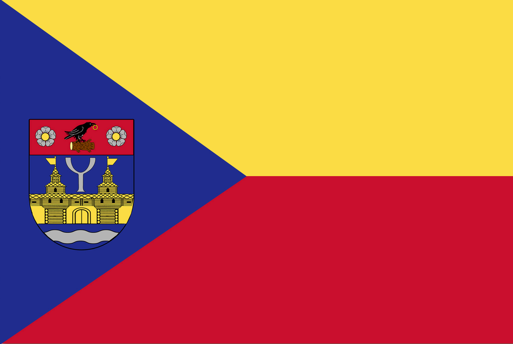 Прапор Чоповицької селищної громади